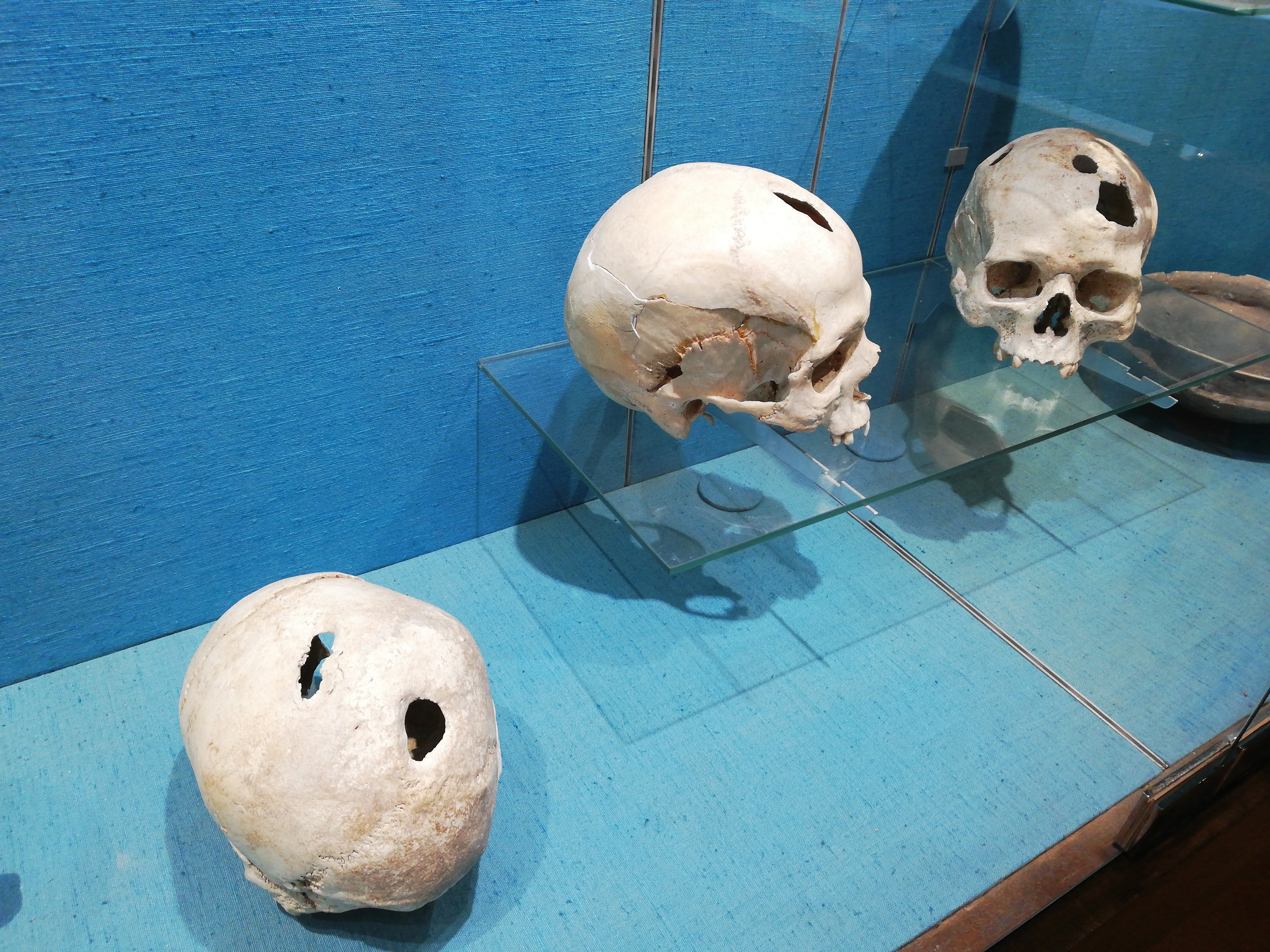 Crânes trépanés de l'âge du bronze, trouvés à Comps-sur-Artuby (83), France. Exposés au Musée d'Archéologie de Saint-Raphaël (83), Provence-Alpes-Côte d'Azur, France. Les personnes ont survécu à leur trépanation, car l'on observe une croissance de l'os (ré-ossification) en bordure des enlèvements des rondelles des crânes.